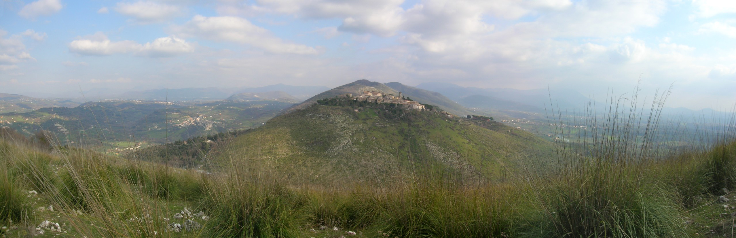 Ruderi di San Martino (Fara in Sabina)